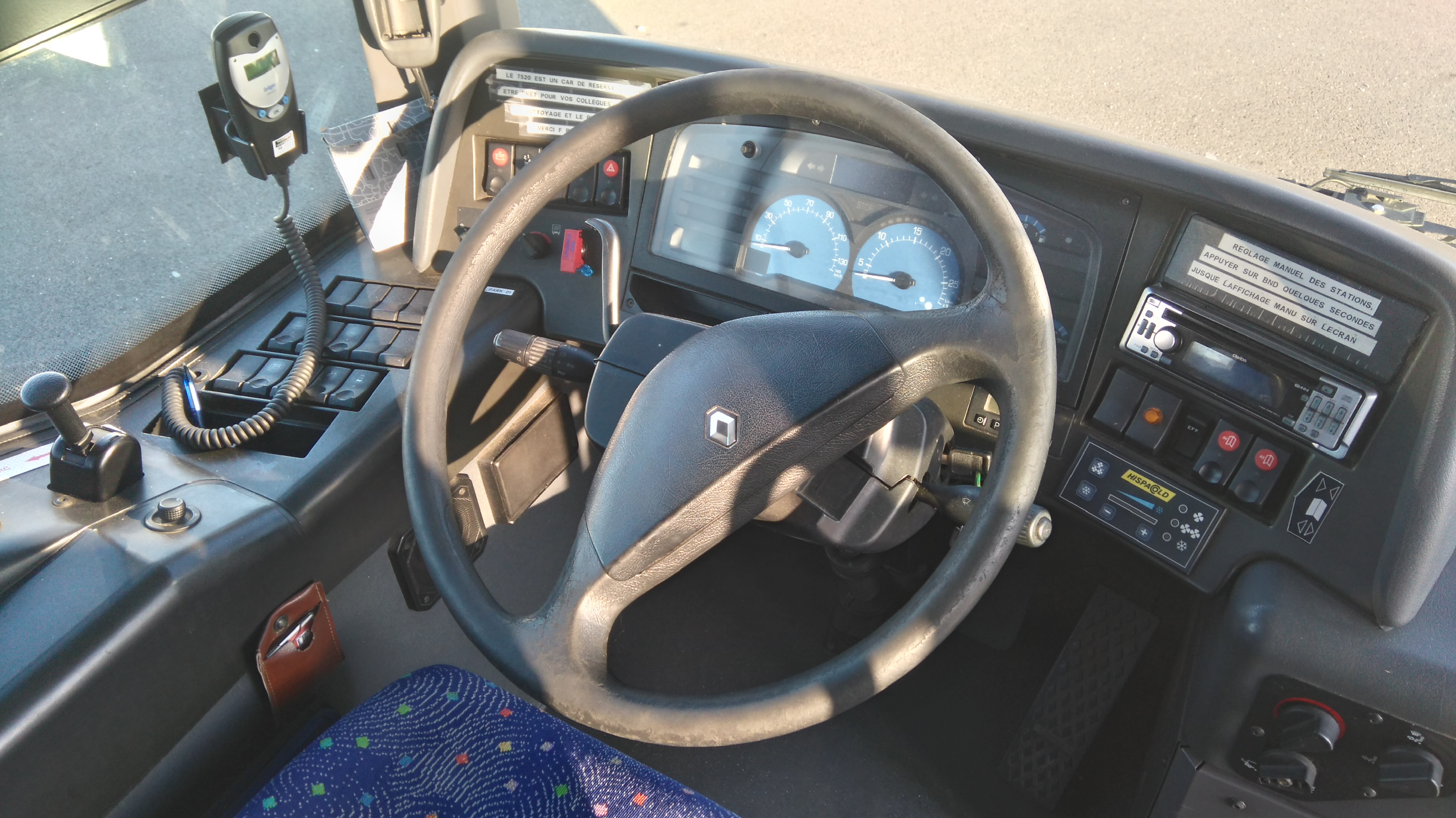 Renault Ares - poste de conduite